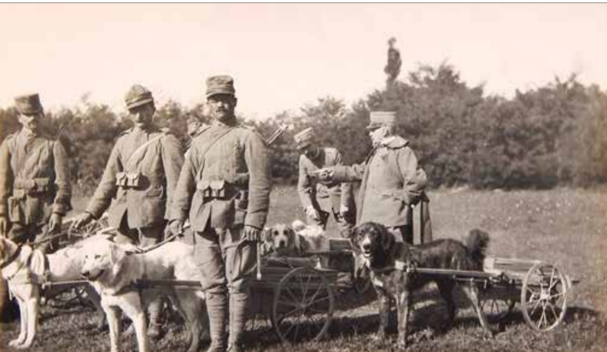 Foto a corredo biografia Marcello Serrazanetti presente in Wikipedia italiano